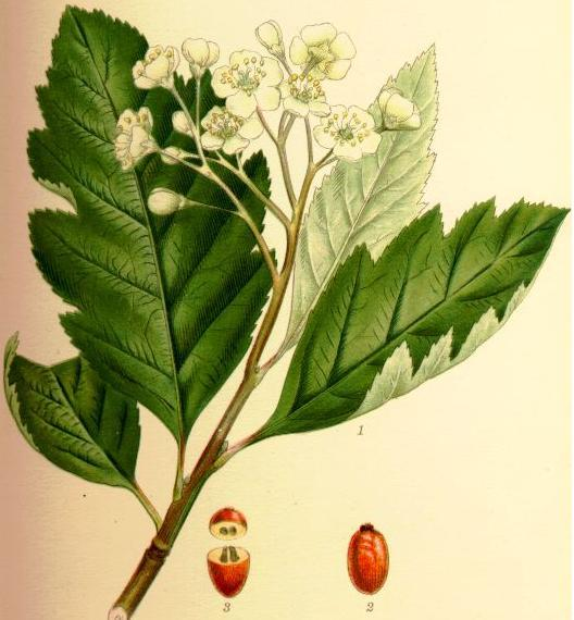 Oxel (Sorbus intermedia)